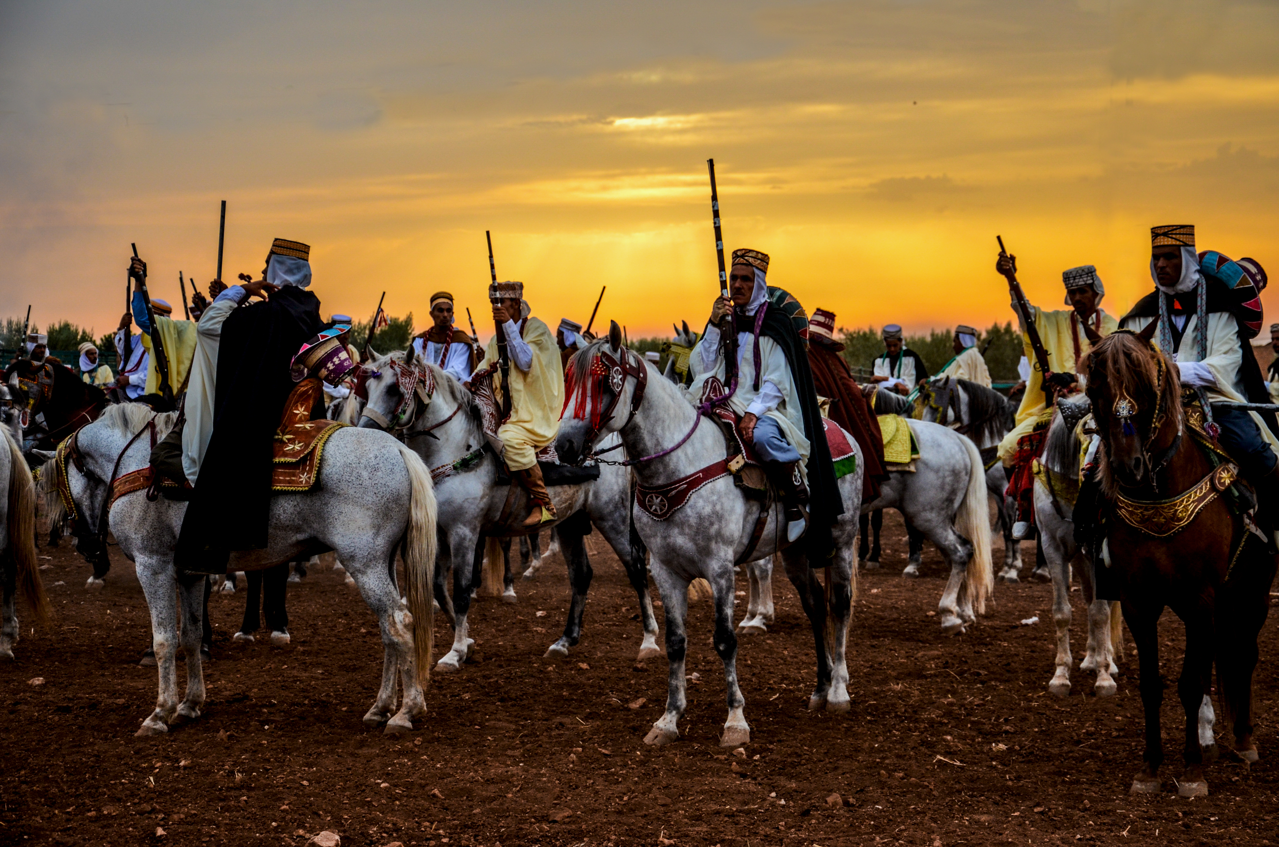 Lors d'une Fantasia à l'Ouest de l'Algerie